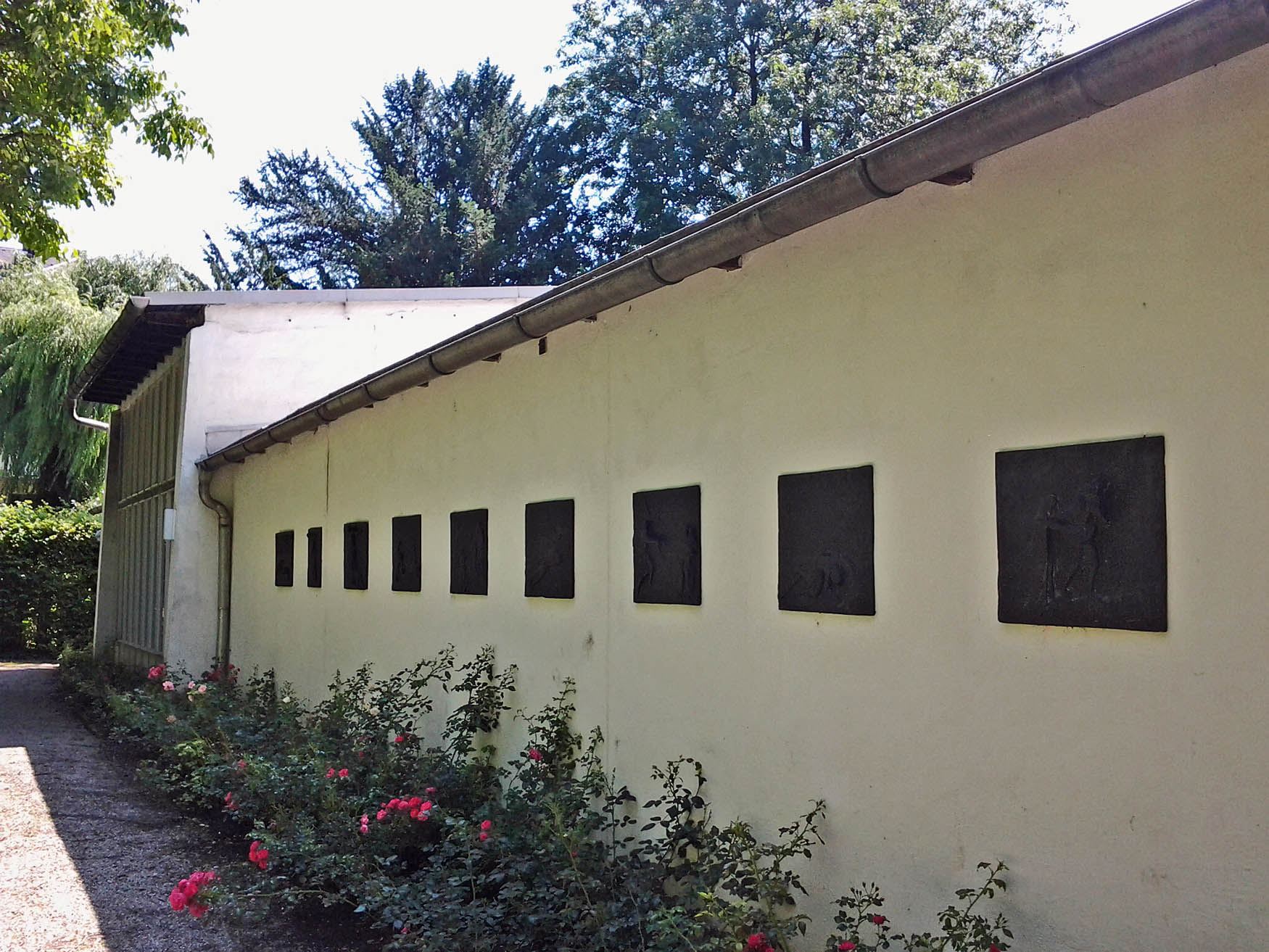 Kommunität Venio Muenchen